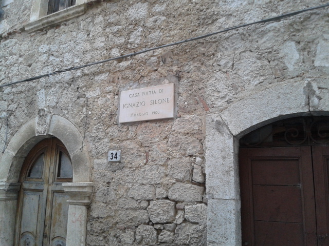 Casa natale di Ignazio Silone